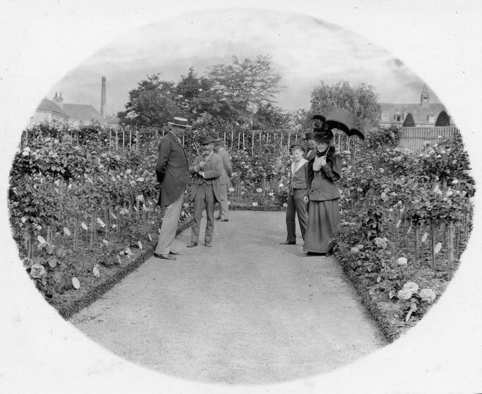 photographie représentant Paul Marmy, directeur du Jardin des Plantes de Nantes, à gauche. Son épouse Désirée et son fils Charles à droite